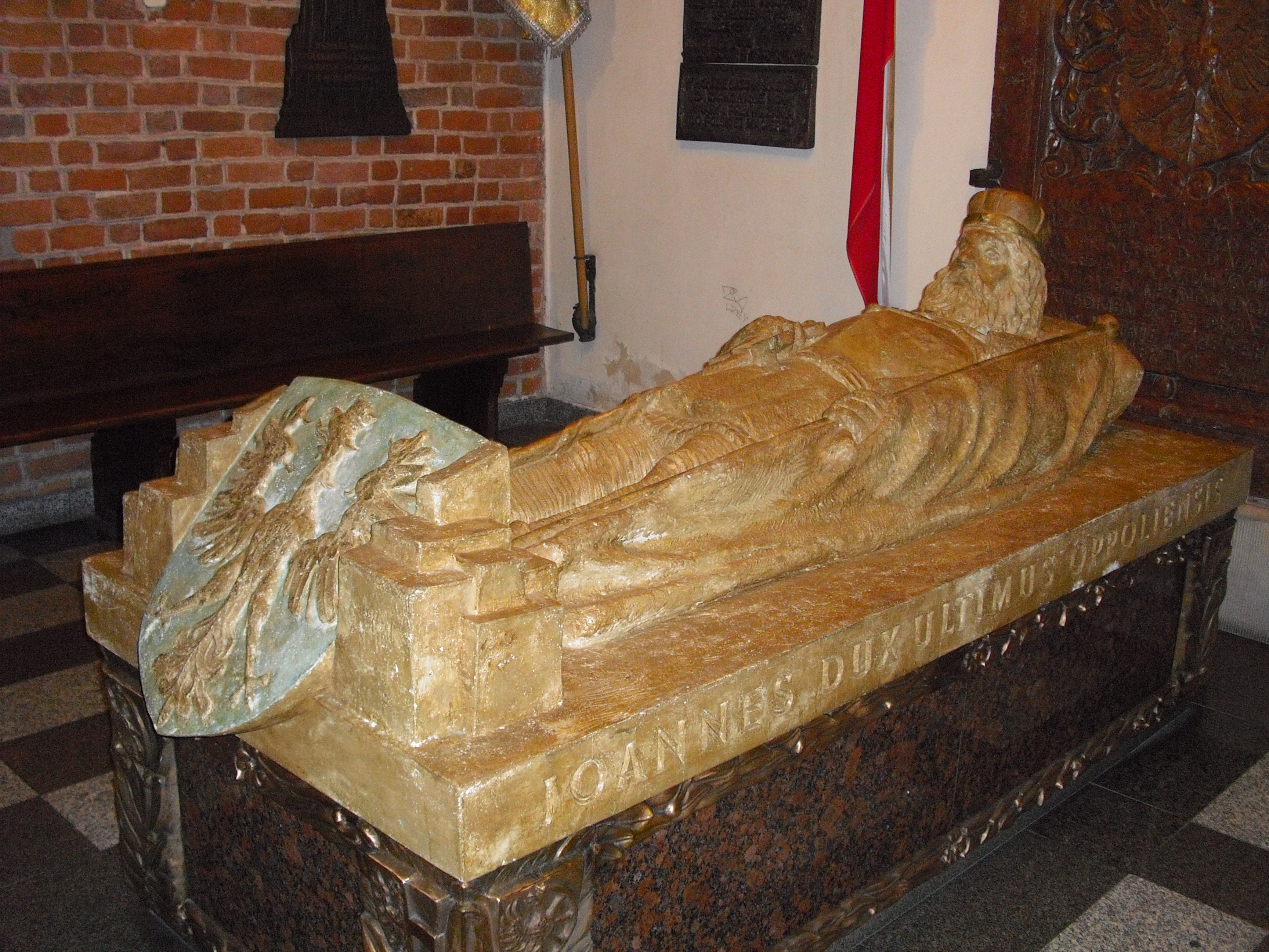 Sarkofag księcia opolskiego Jana II Dobregow Katedrze św. krzyża w Opolu